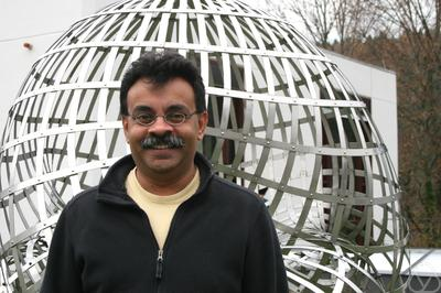 Foto di Madhu Sudan